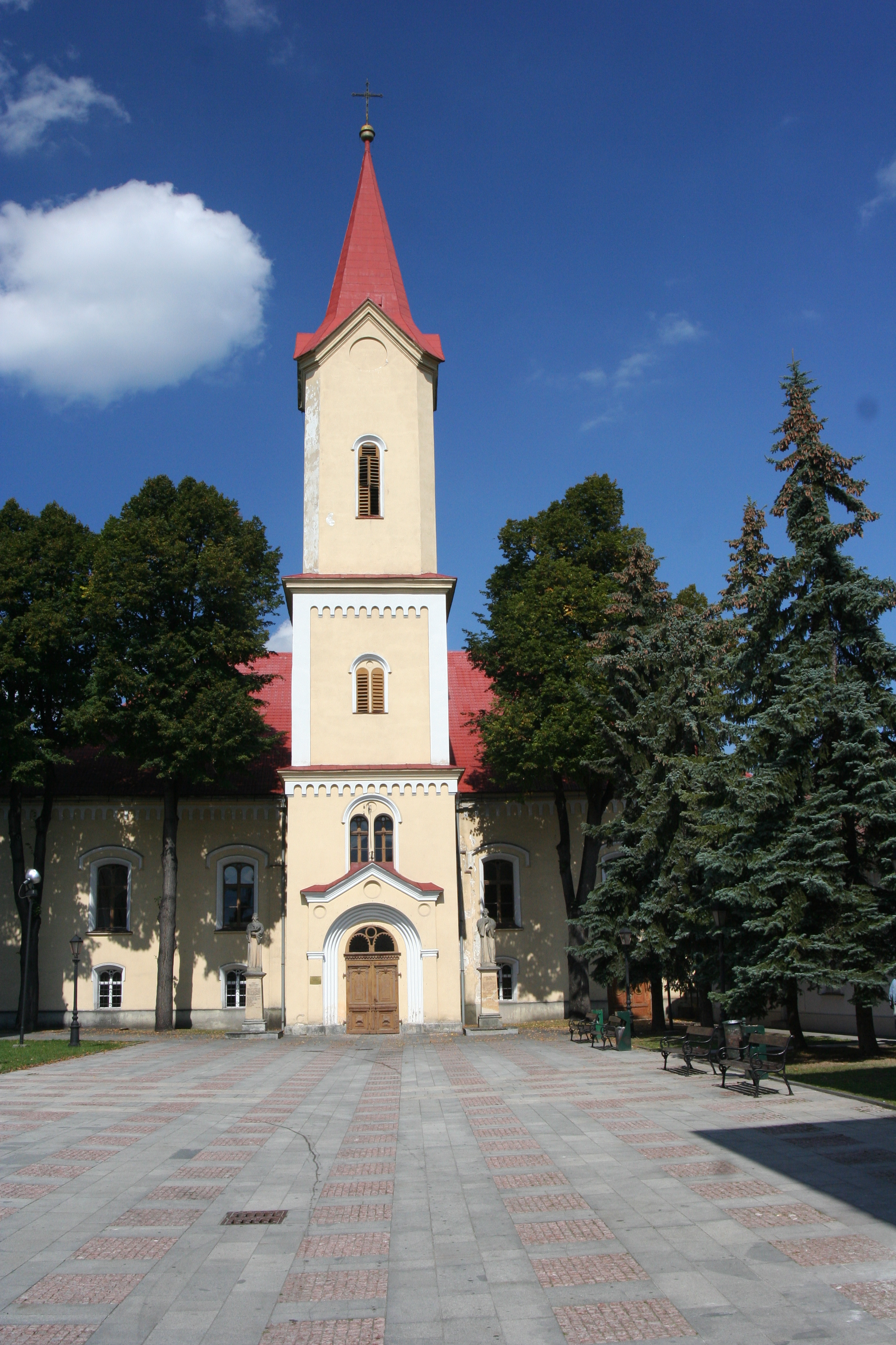 Evangelical Church (Evanjelický kostol) Liptovský Mikuláš, Slovakia.